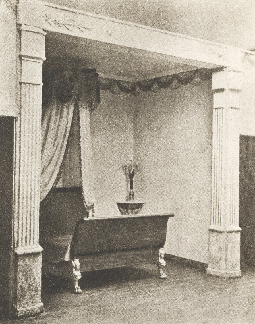 "Clason-Hebbeska huset" vid Skeppsbron 18 i Stockholm, interiör